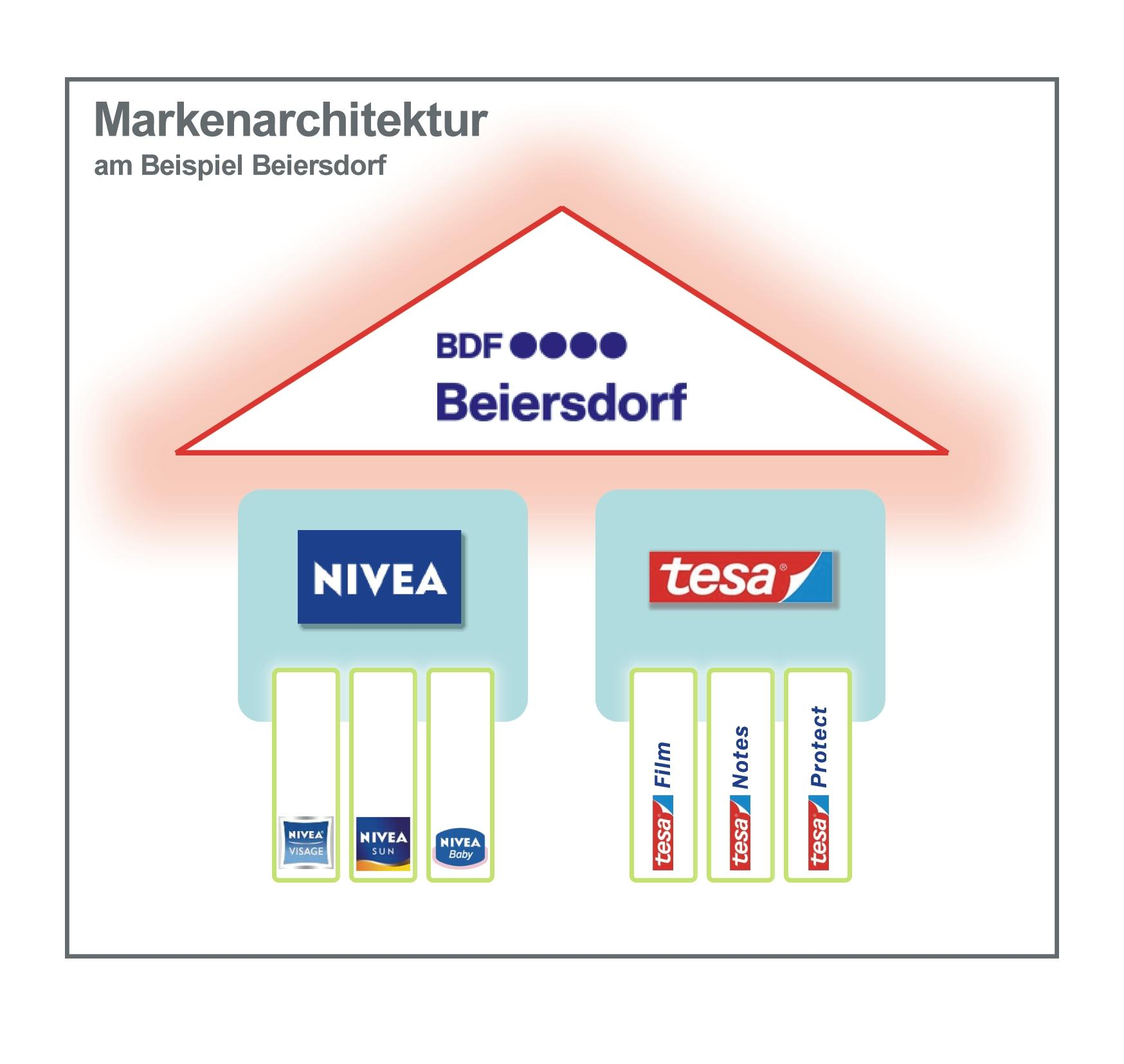 Aufbau der Markenarchitektur